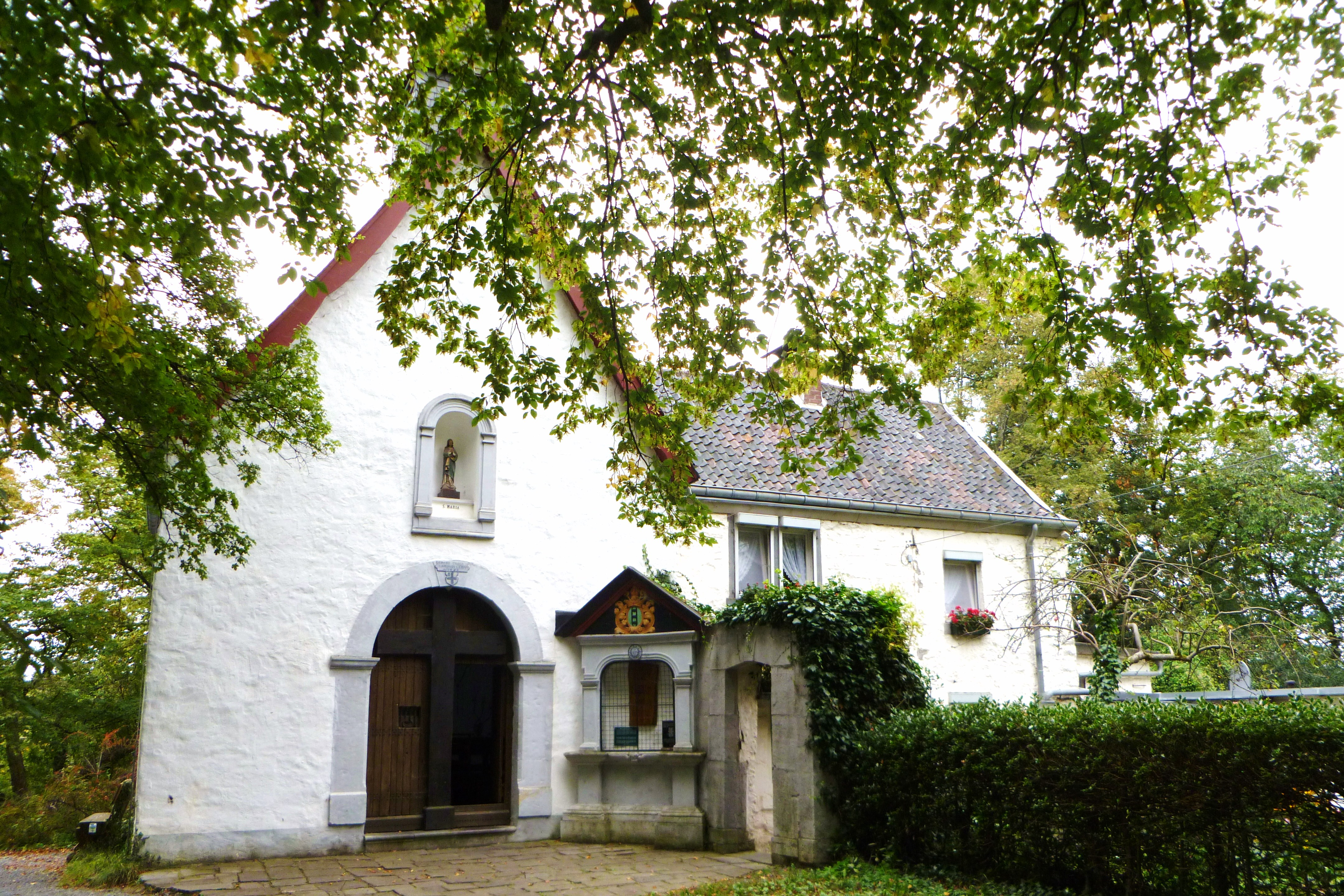 Baudenkmal in Kornelimünster - Einsiedelei